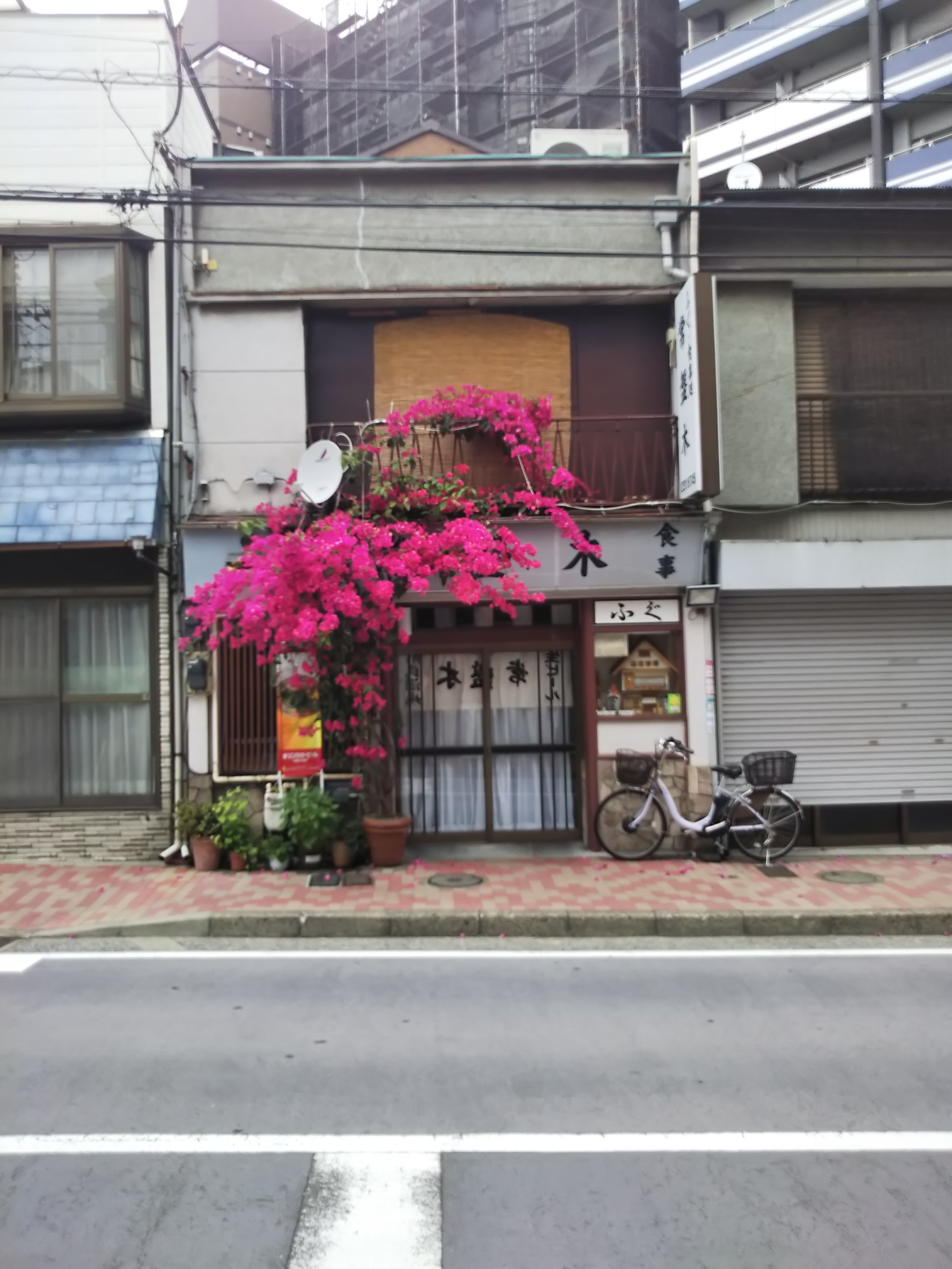 横浜市西区戸部町、市民酒場の「常盤木」。まだお昼なので開店前。